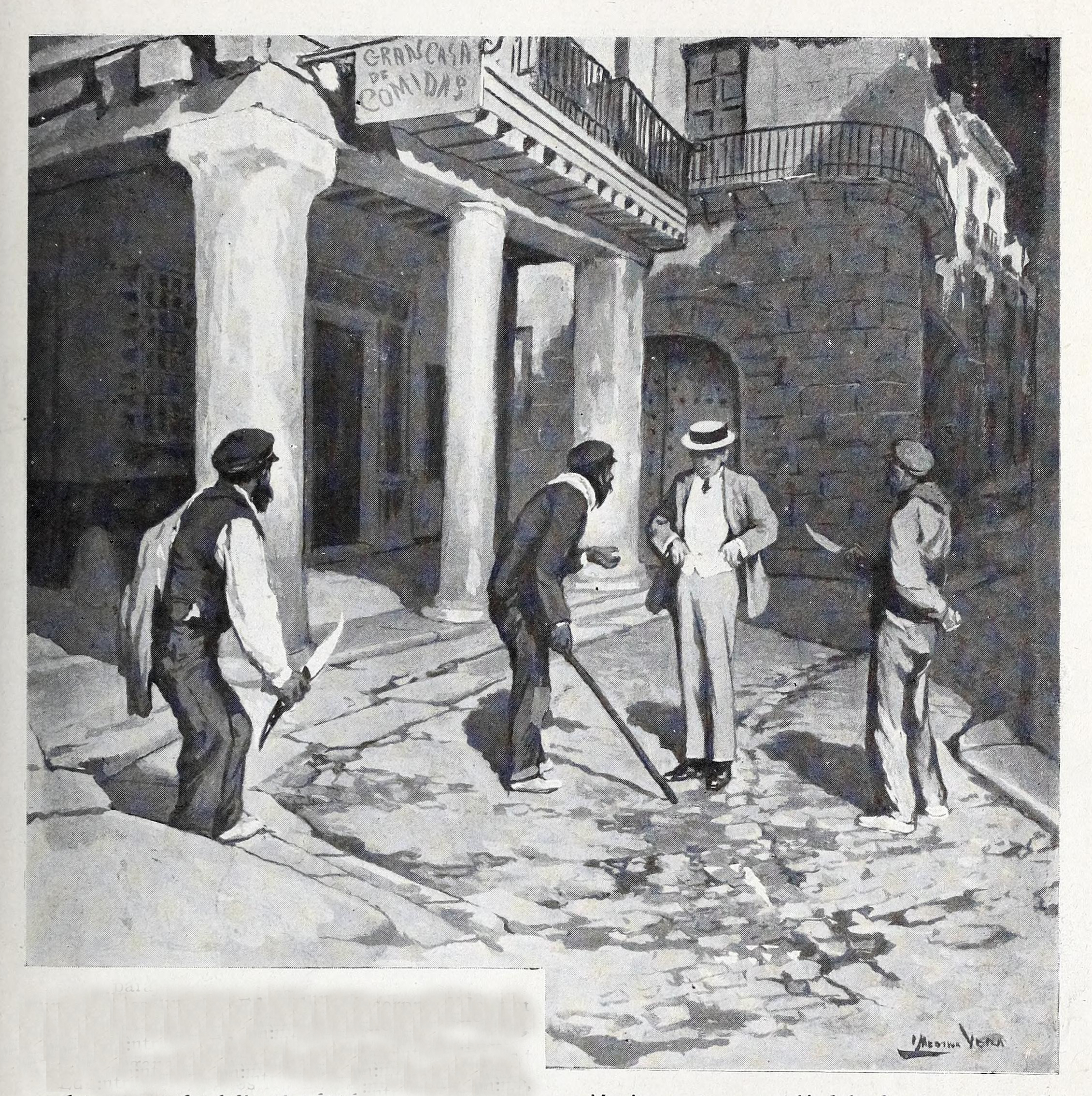 El sentido filosófico.